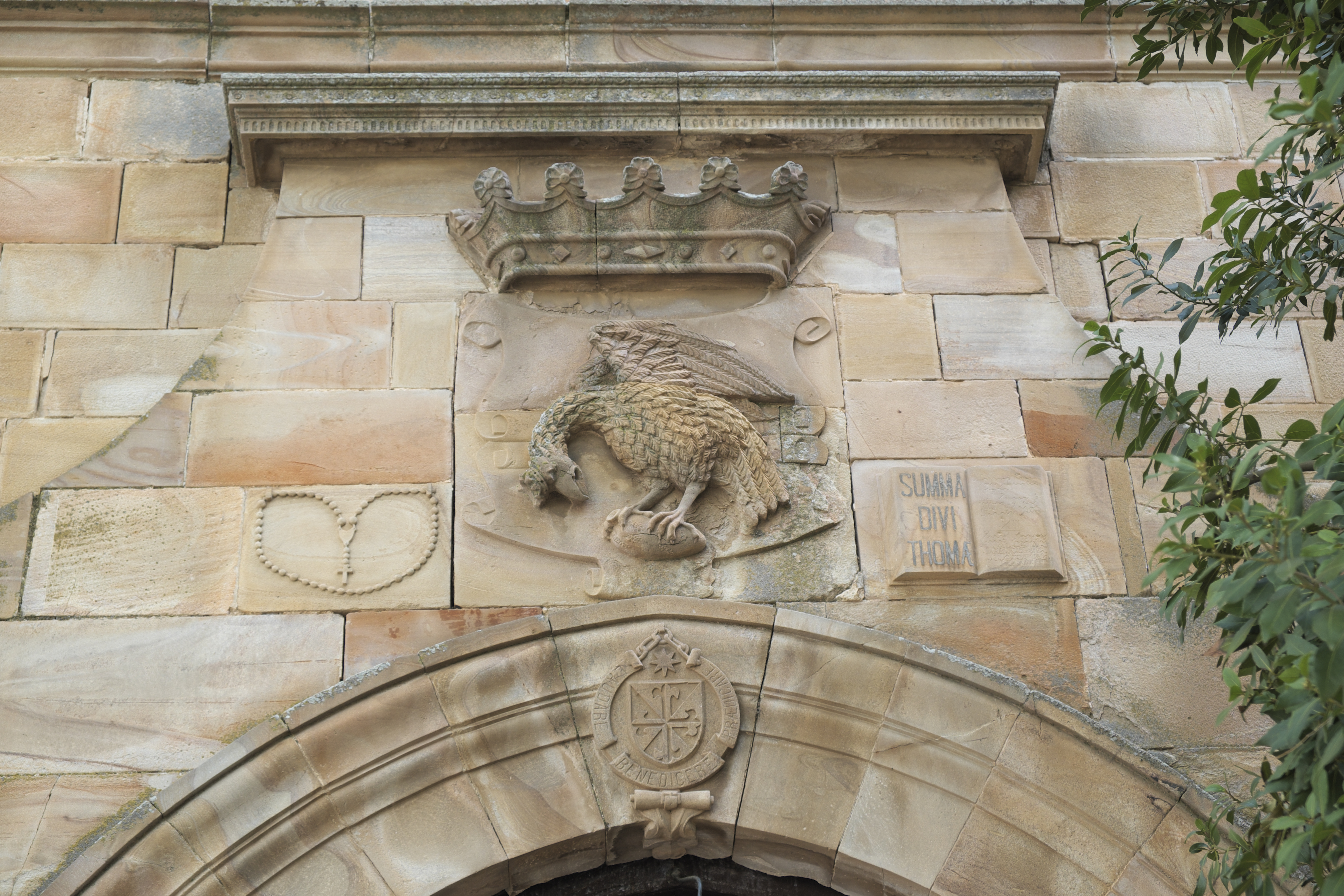 Ehemaliges Frauenkloster des Calatrava-Ordens, Convento de la Asunción (Mariä Himmelfahrt), in Almagro in der Provinz Ciudad Real (Kastilien-La Mancha/Spanien), Relief über dem Eingang zur Kirche